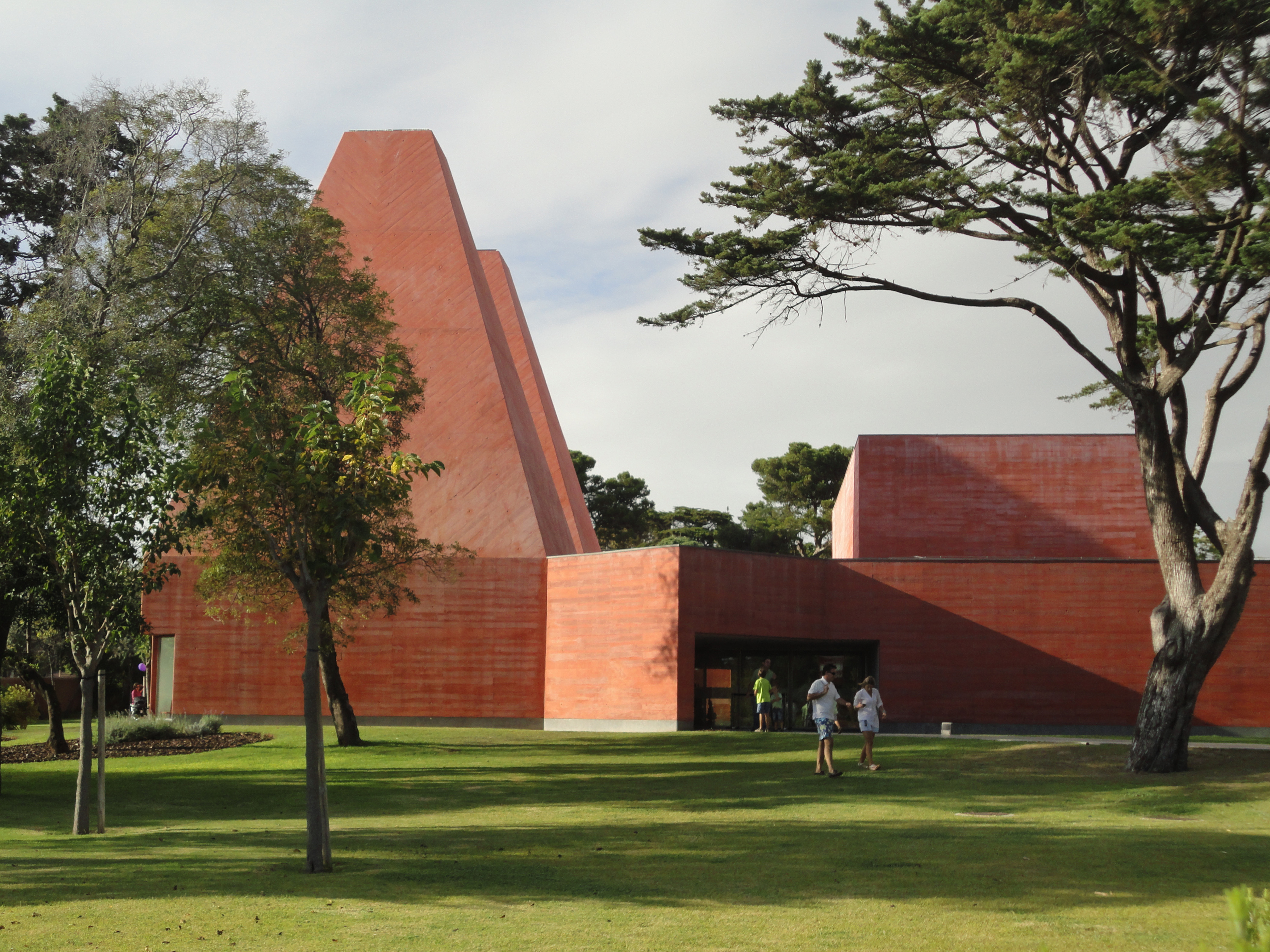 Casa das Historias Paula Rego, Cascais; Arq. Souto de Moura